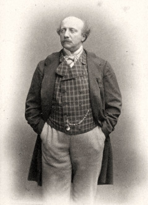 Каликст Густав Бирон (1817—1882)